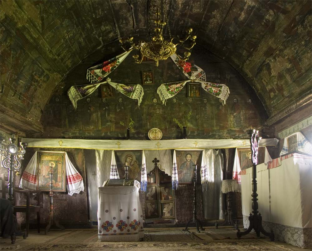 Biserica de lemn din Sic, interiorul navei.